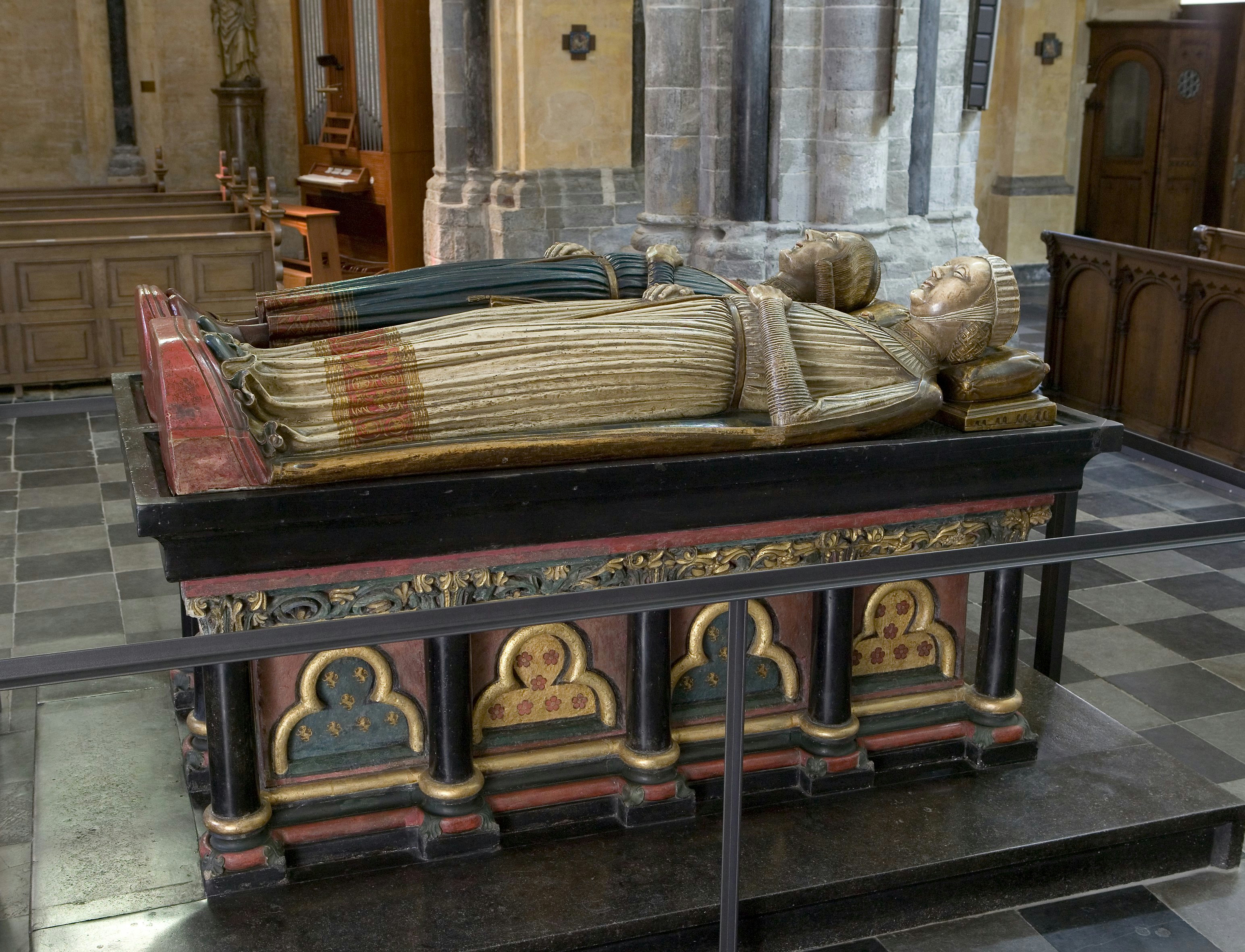 Munsterkerk Of Onze Lieve Vrouwe Kerk: Interieur, zicht op het praalgraf van Graaf Gerard IV van Gelre en Margaretha van Brabant na de restauratie, staat onder de vieringtoren (opmerking: Gefotografeerd voor de Nieuwsbrief nummer 5 in 2007)